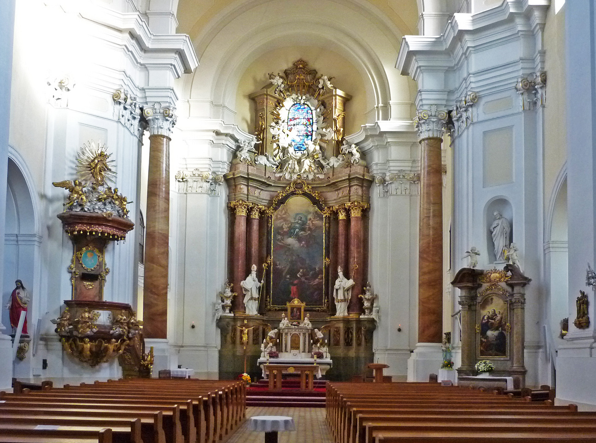 Mariä-Himmelfahrts-Pfarrkirche in Kremsier (Kroměříž) in Mähren